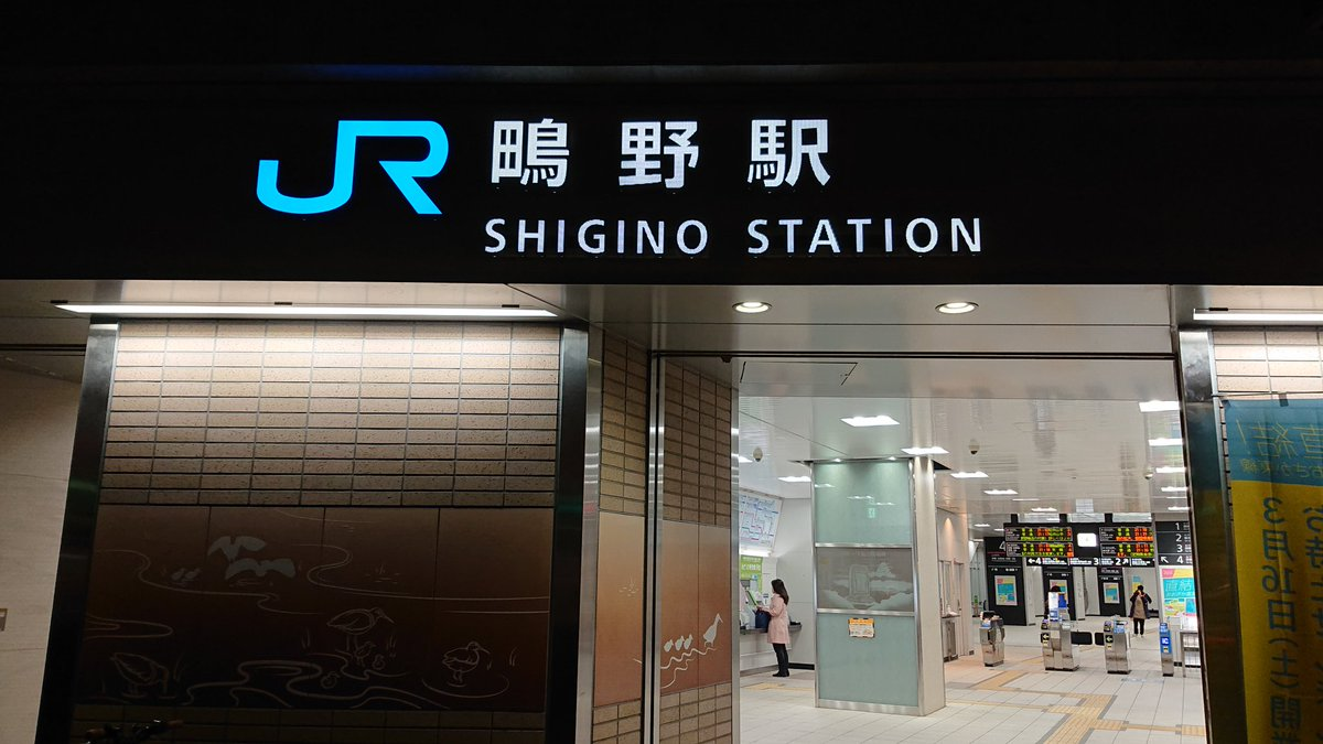 JR_Sigino